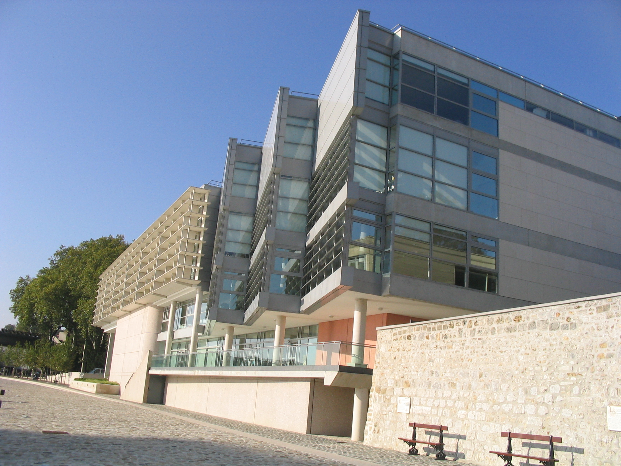 La médiathèque de Melun, quai de la Reine Blanche, à Melun(France).